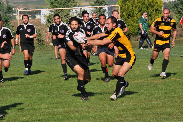 Equipe des Athens Rugby